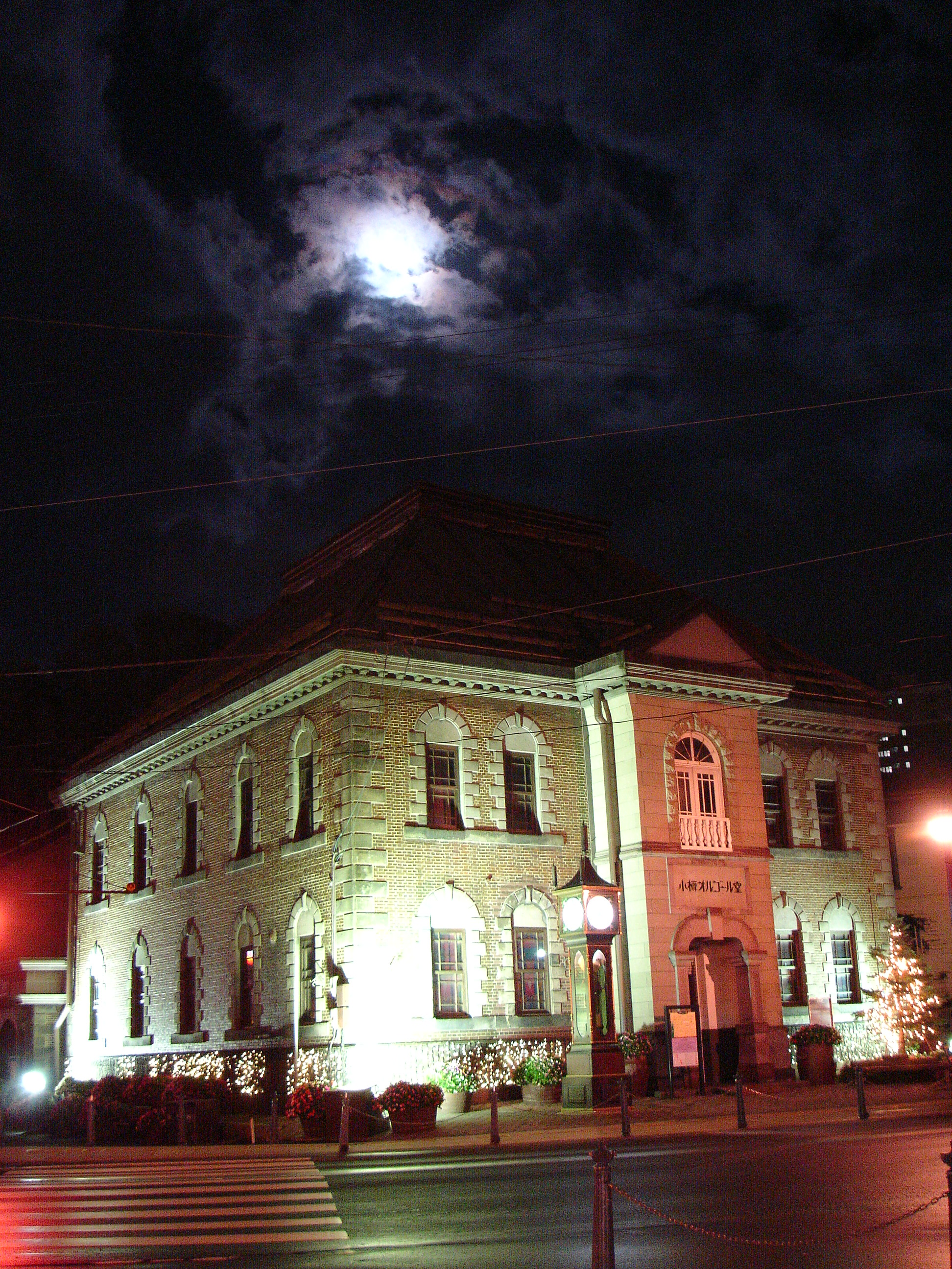 小樽オルゴール堂